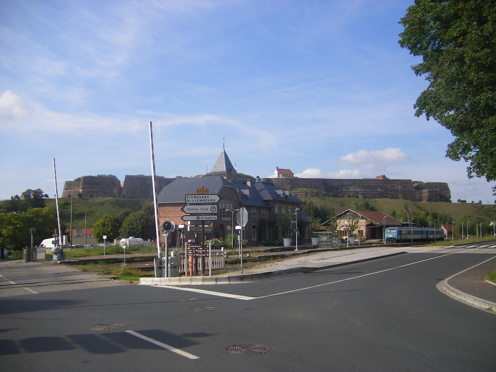 Bitche